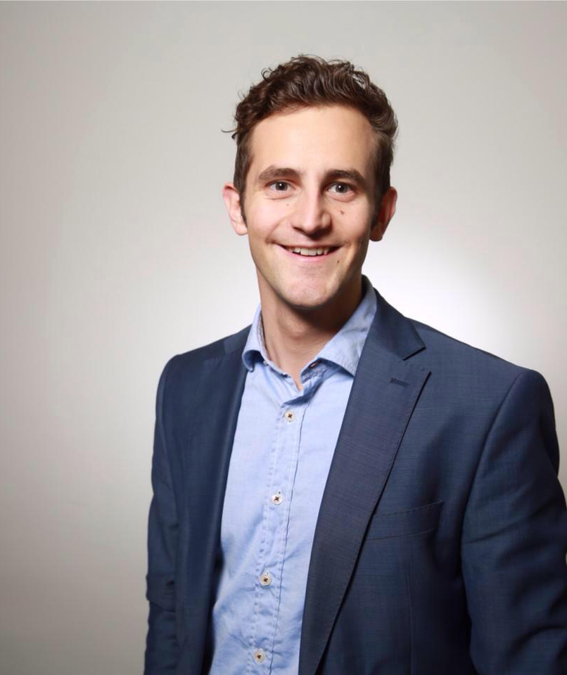 LO Schnitzer 2016